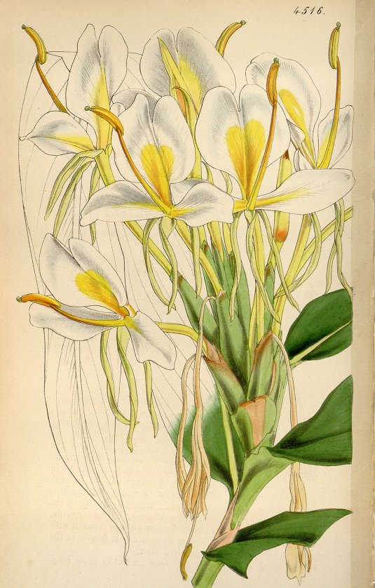 Hedychium coronarium J.König Planche 4516 du Curtis's Botanical Magazine Vol 76 année 1850 sous le nom de Hedychium chrysoleucum